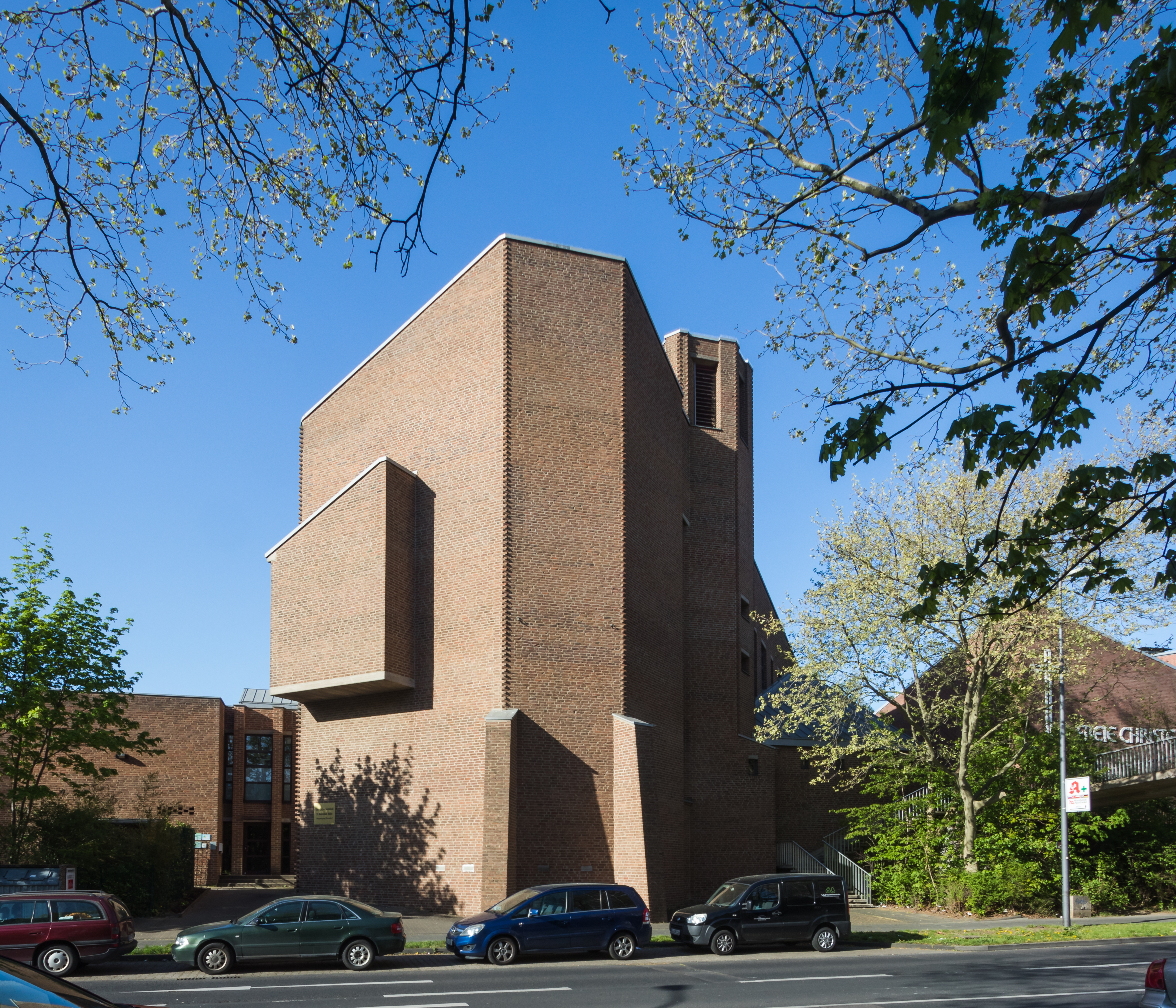 St. Maximilian Kolbe, Köln-Porz-Finkenberg, Architekt: Hans Schilling